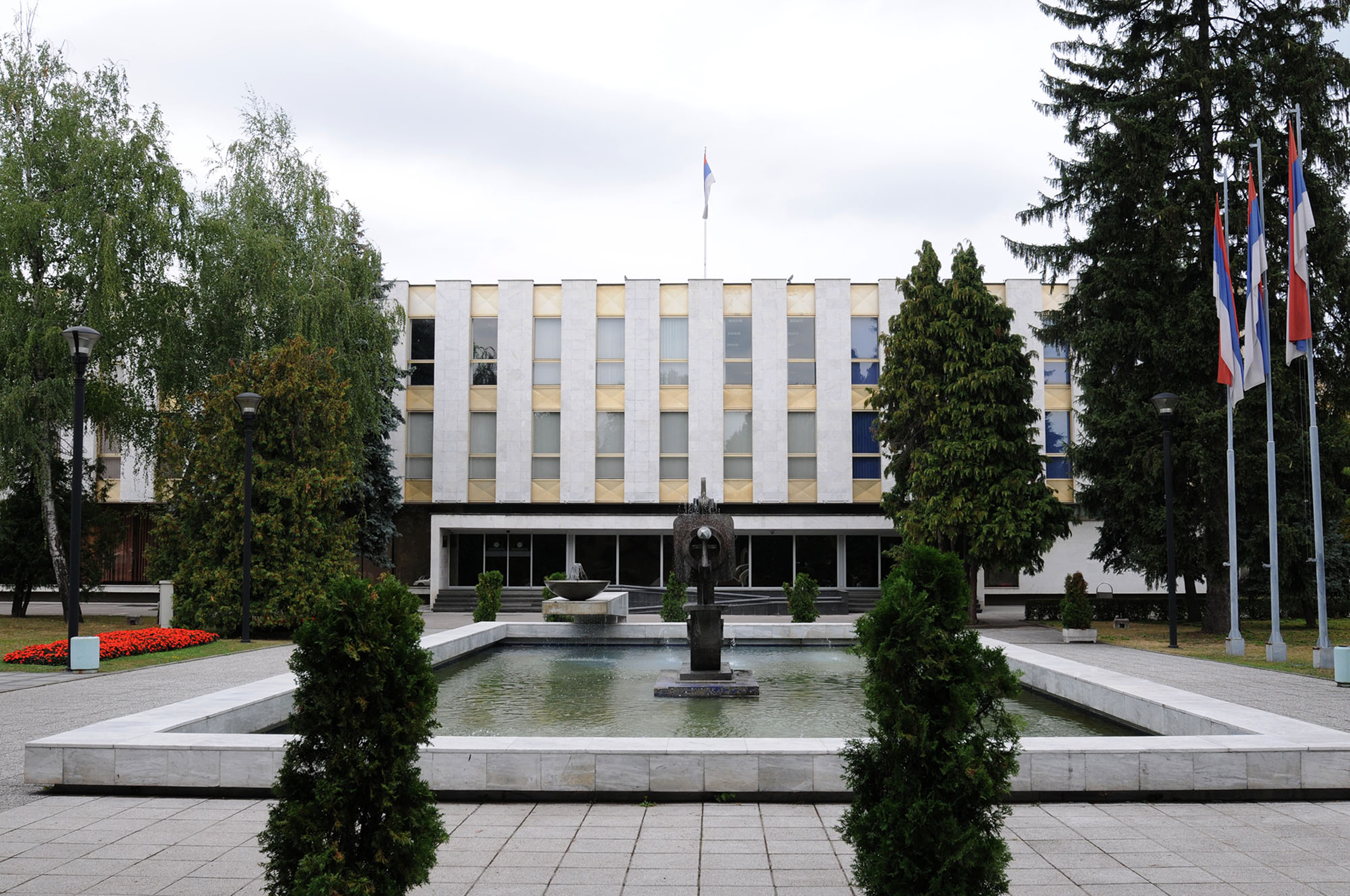 Zgrada narodne skupstine RS,nekad dom JNA Banja Luka Сликава е подигната во рамките на проектот „По трагата на душата 2015“.